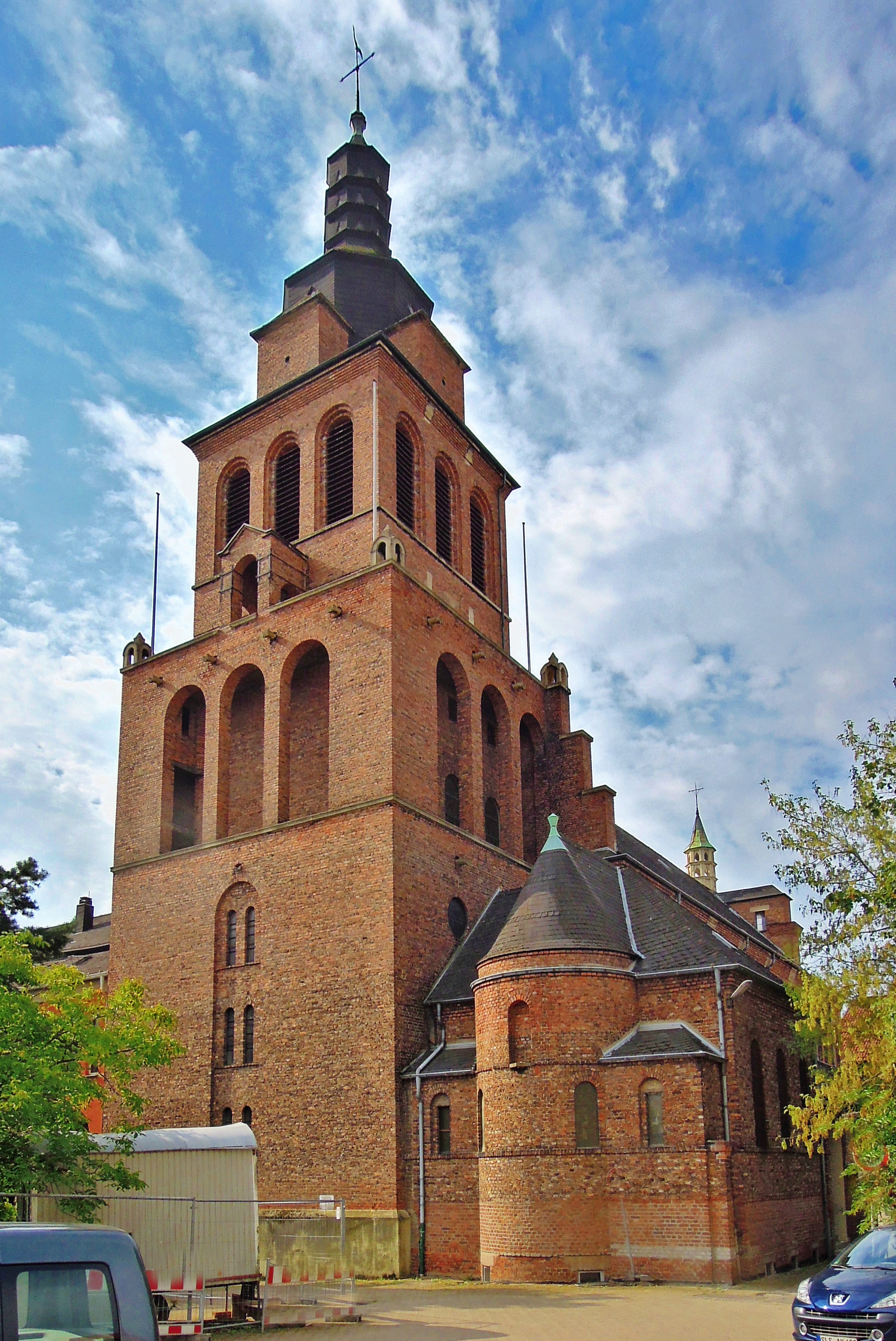 Am Kloster 6, kath. Pfarrkirche Allerheiligen, 1927–29 von Peter Marx (Einzeldenkmal)